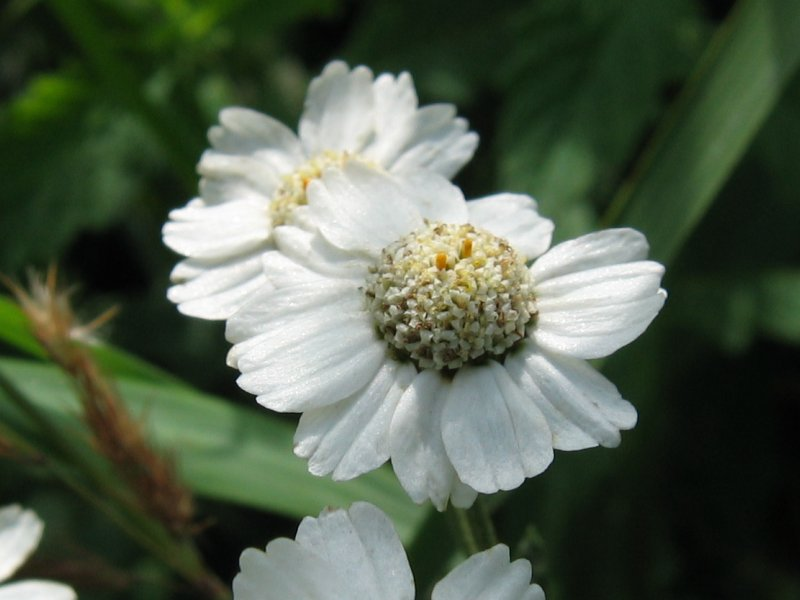 Weidenblättrige Sumpf-Schafgarbe (Achillea salicifolia)